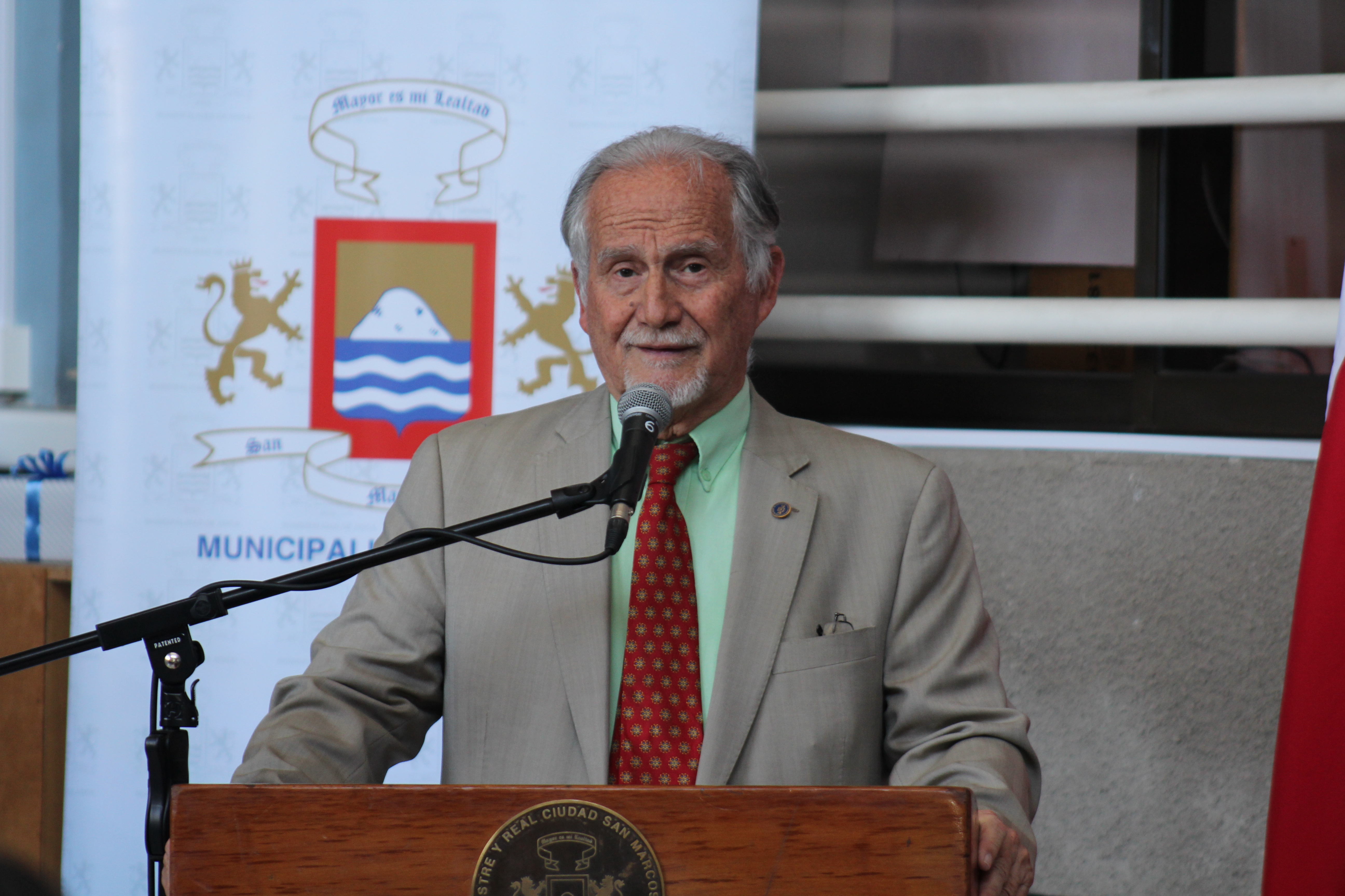 Ministro Osorio entrega inmueble para Centro de Creación en Arica